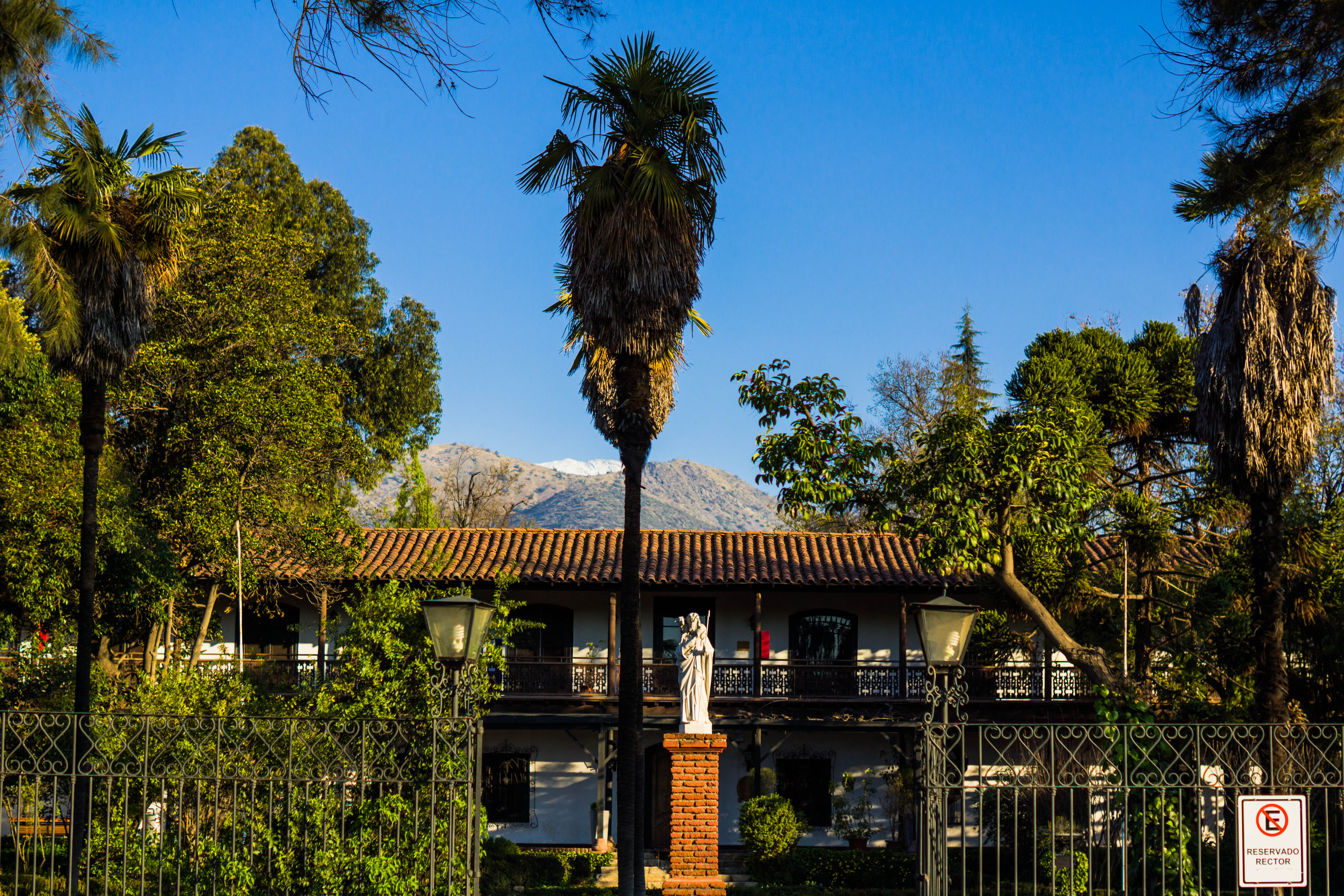 Casona de Las Condes This is a photo of a national monument in Chile: 847